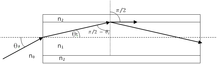 Angulo de aceptación en Fibras Ópticas.